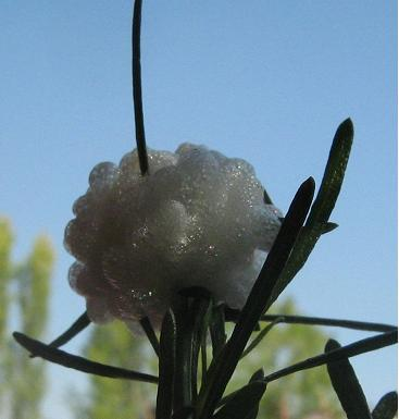 Agallas de romerillo de Chile penarc misma imagen de la pagina